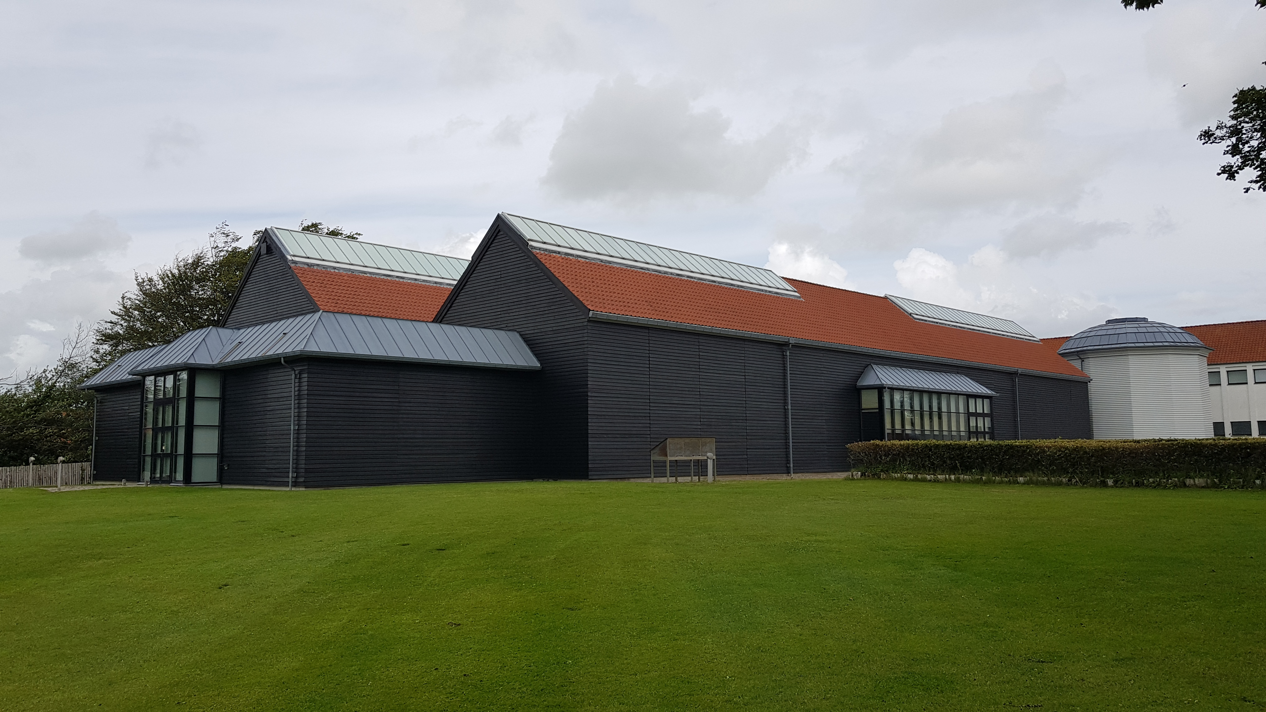 Tønder Kunstmuseum